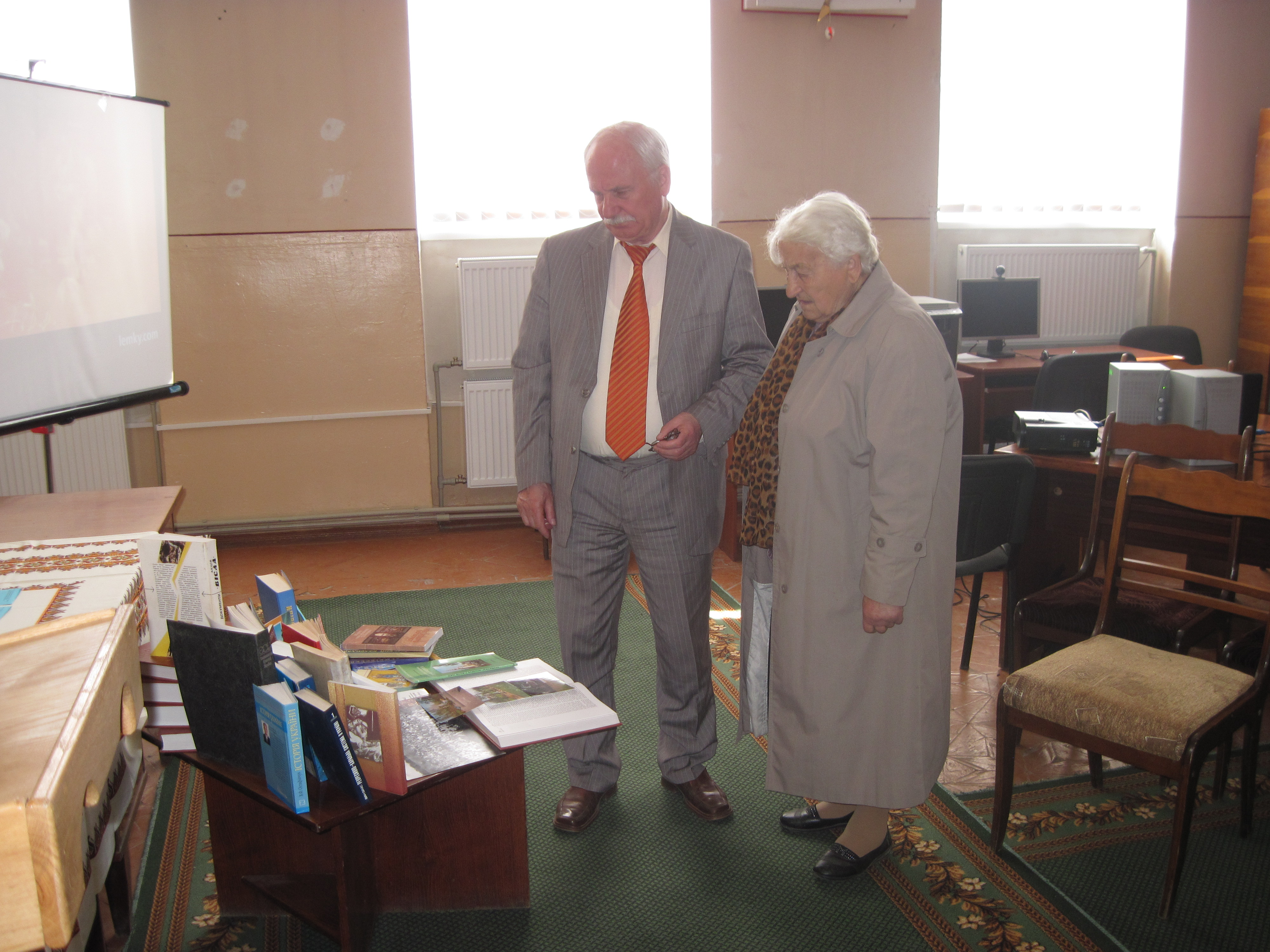 Український мистецтвознавець, краєзнавець, педагог, діяч культури Ігор Дуда та громадська діячка Бучаччини Ореста Синенька на конференції в Бучацькій ЦРБ, осінь 2014